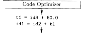 գագ